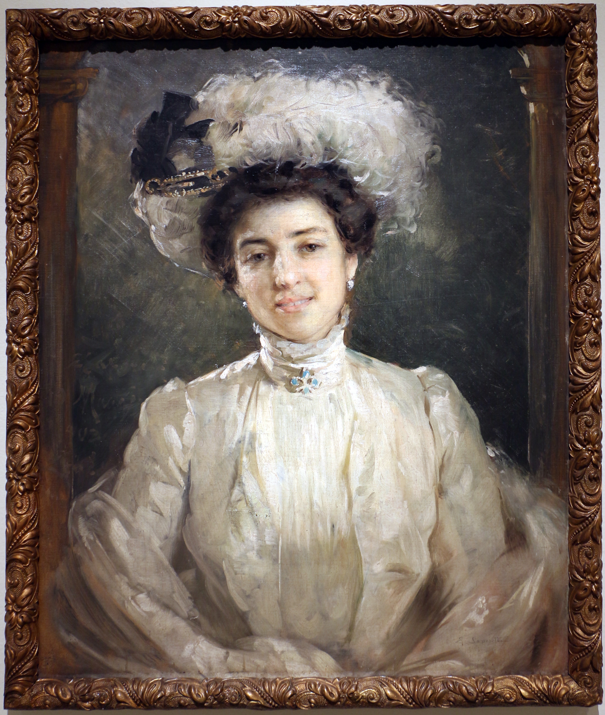 ritratto della moglie Antoniettatitle QS:P1476,it:"ritratto della moglie Antonietta" label QS:Lit,"ritratto della moglie Antonietta" label QS:Lde,"Porträt seiner Frau Antonietta"